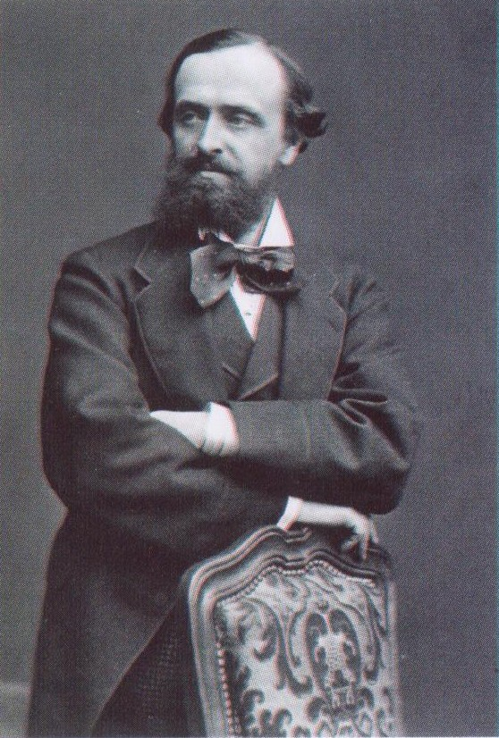 Kreivi Carl Robert Mannerheim, C. G. E. Mannerheimin isä.